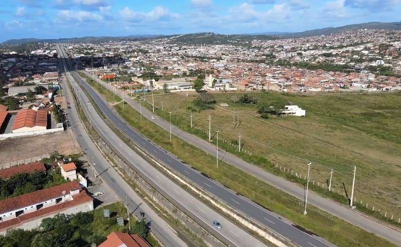 Gravatá (Pernambuco)